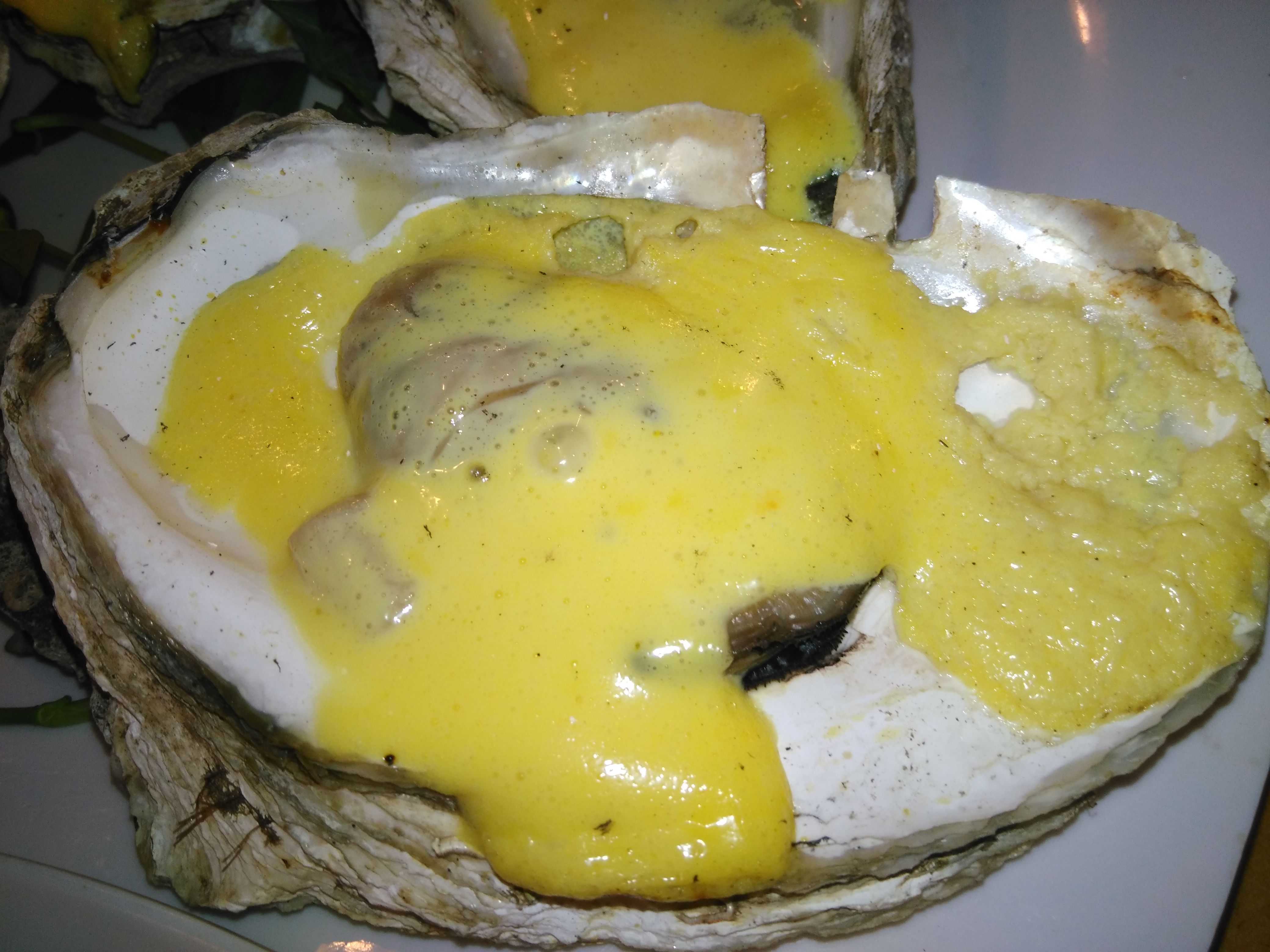 Hình tự chụp bằng di động cá nhân về một con hàu sữa nướng phô mai tại một nhà hàng ở quận Gò Vấp, TP.HCM, nguồn hào lấy từ biển Cần Giờ (Tại quán Saigon New - Phạm Văn Đồng, Quận Gò Vấp)